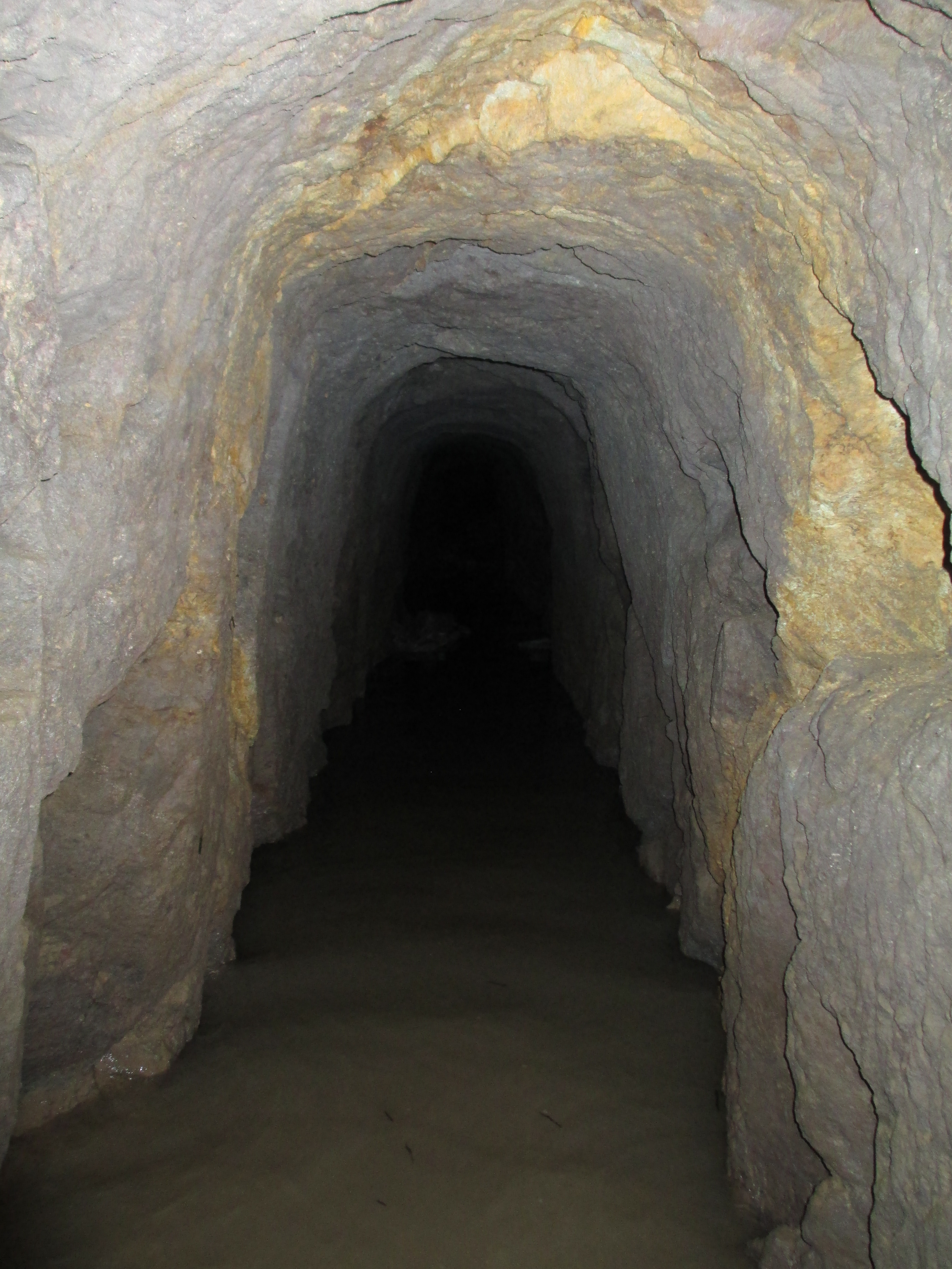 Štola sv. Vojtěcha